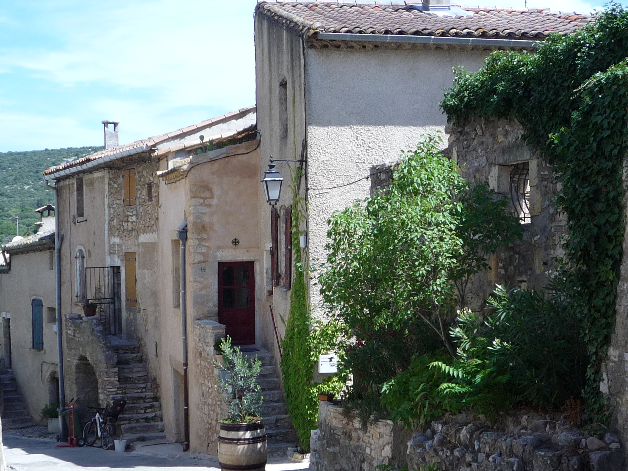 la circulade autour du fort